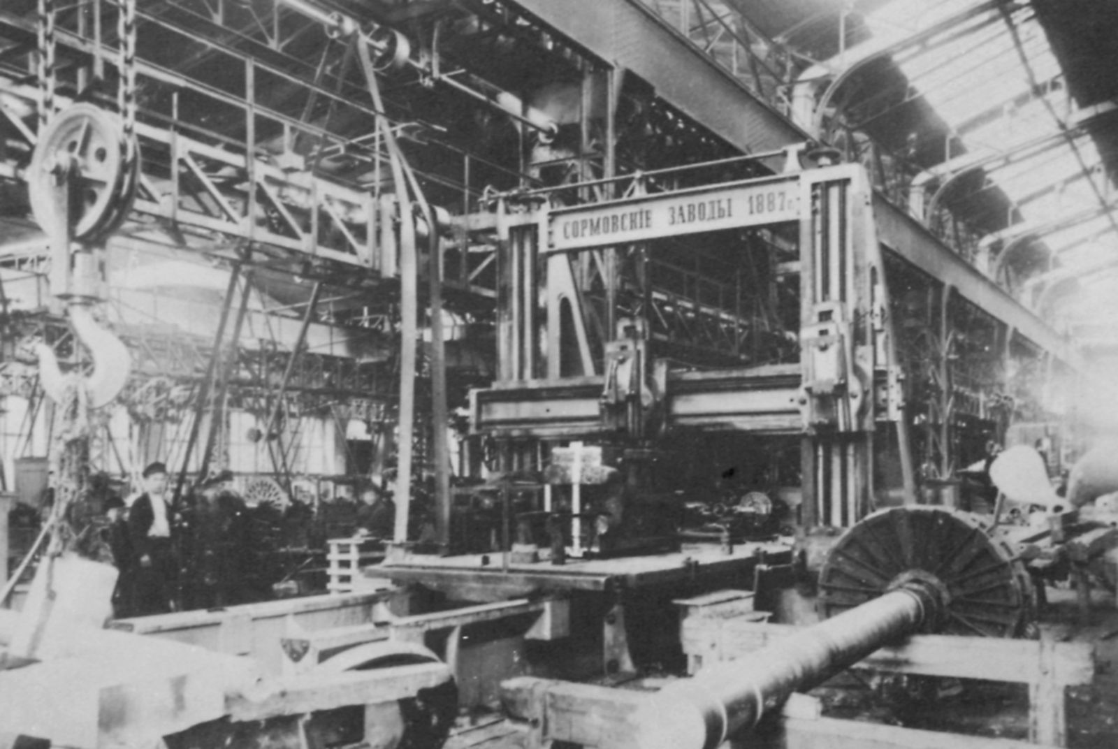 Russischer Photograph um 1897: Das Blechwalzwerk der Sormovo-Werke an der Wolga unweit Nischnij-Nowgorod [2]